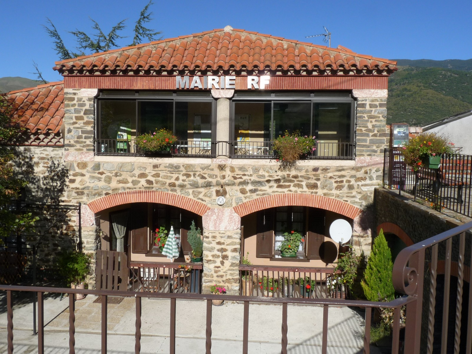 Mairie de Souanyas, Pyrénées-Orientales, France